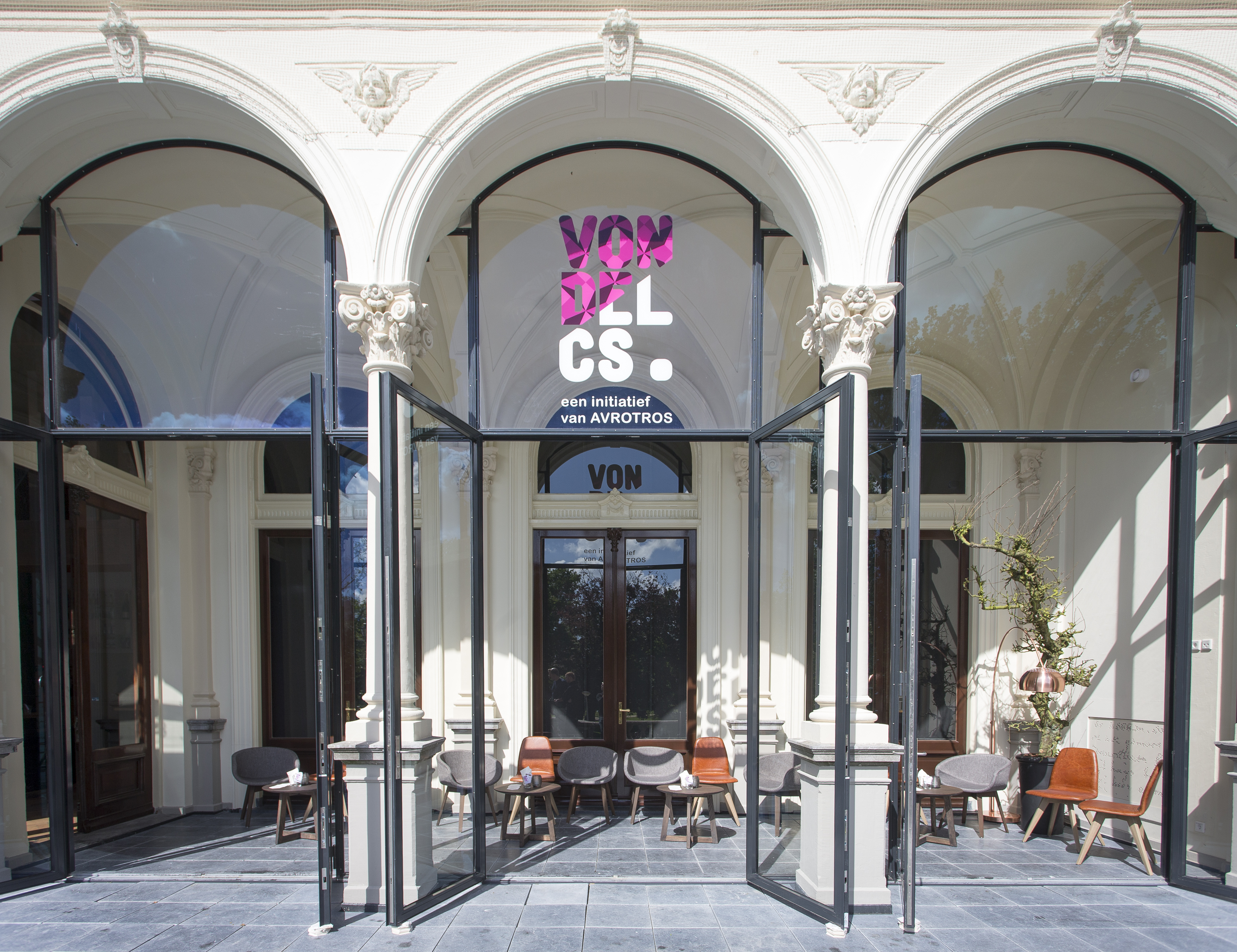 Als de deuren van de wintertuin naar de Studio open, loop je zo VondelCS in